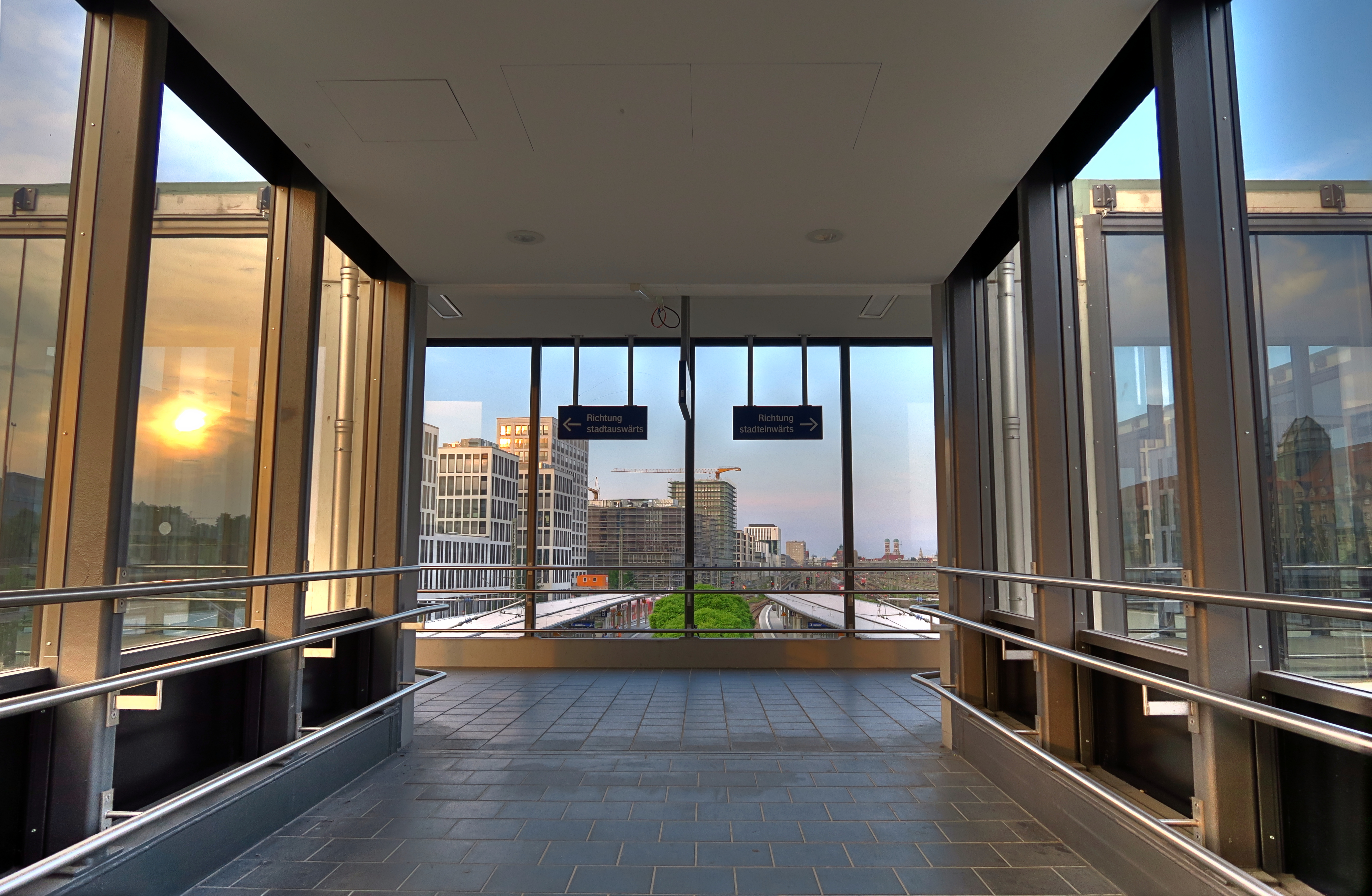 Deutschland, Bayern, München, S-Bahn-Station "Donnerbergerbrücke", Bahnsteigzugang über Brückenkonstruktion